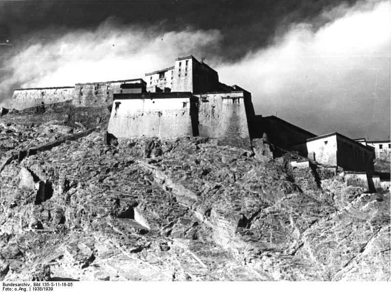 Gyantse, Dzong